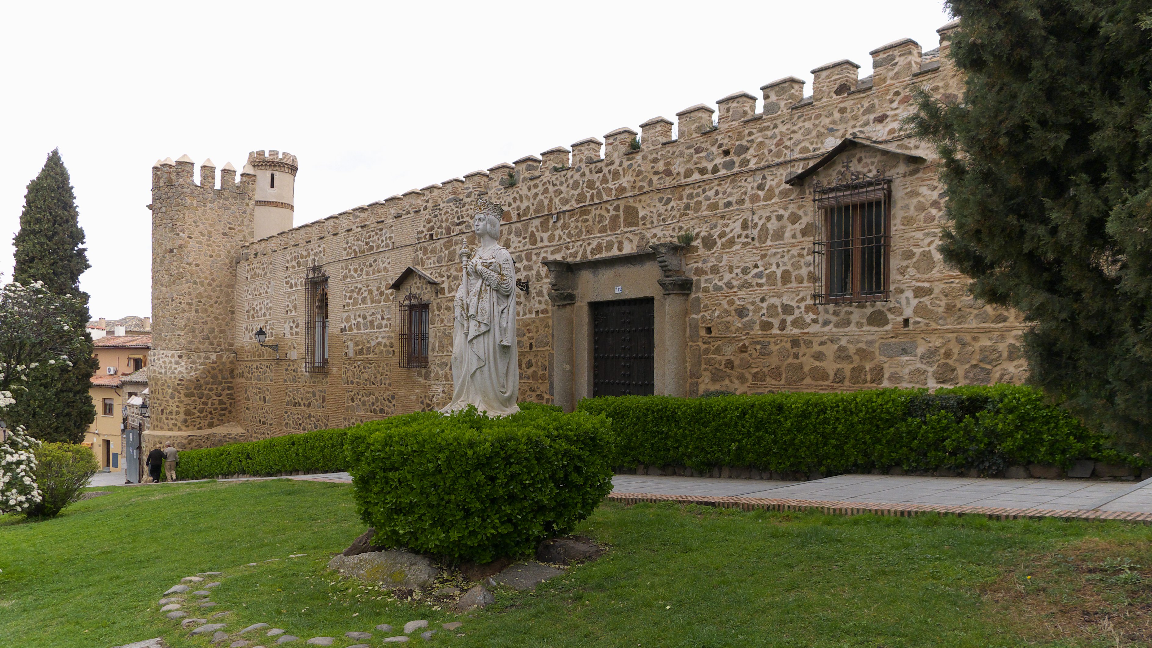 Antiguo palacio de los Duques de Maqueda, hoy reconstruído.